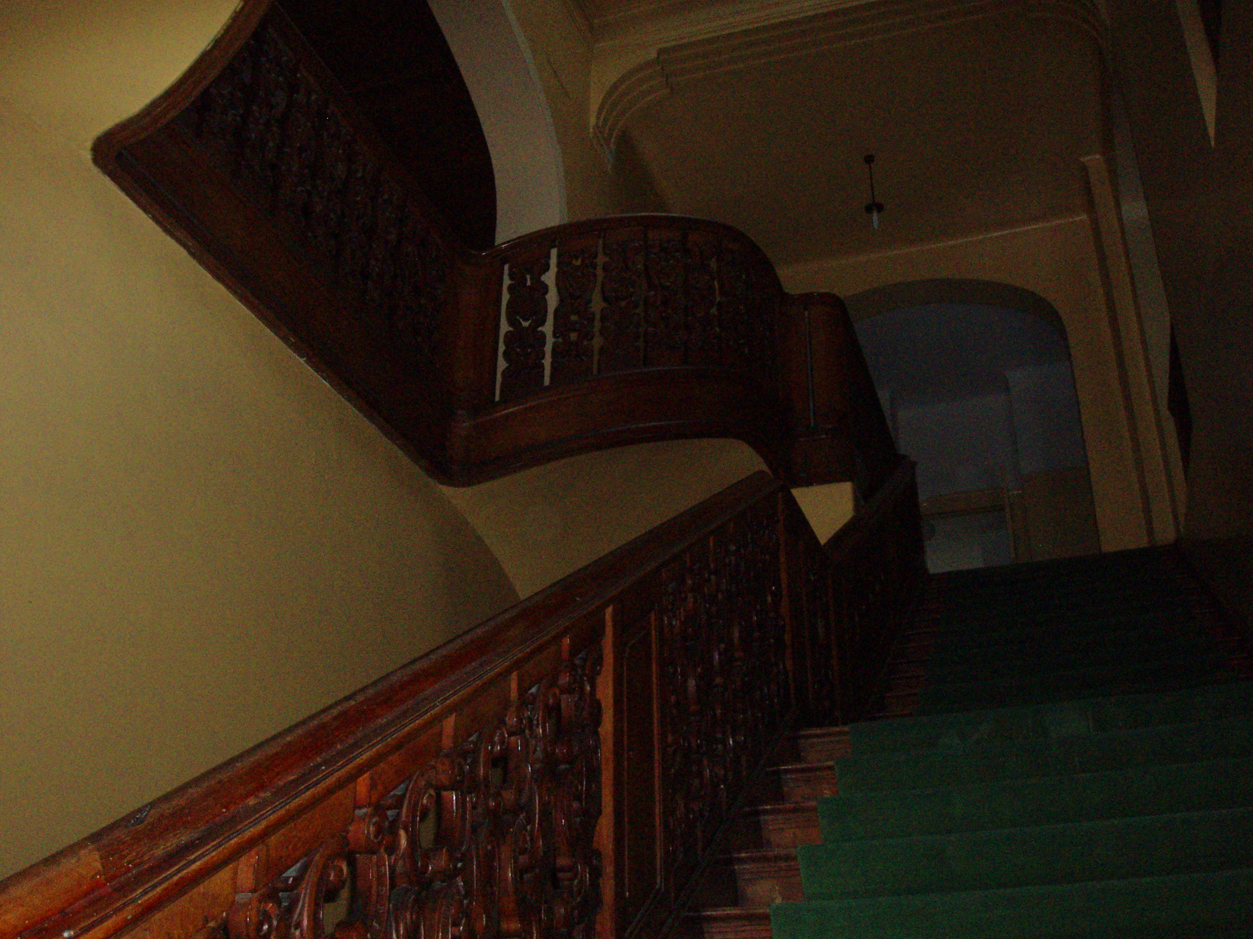 Pałac w Łężanach, klatka schodowa